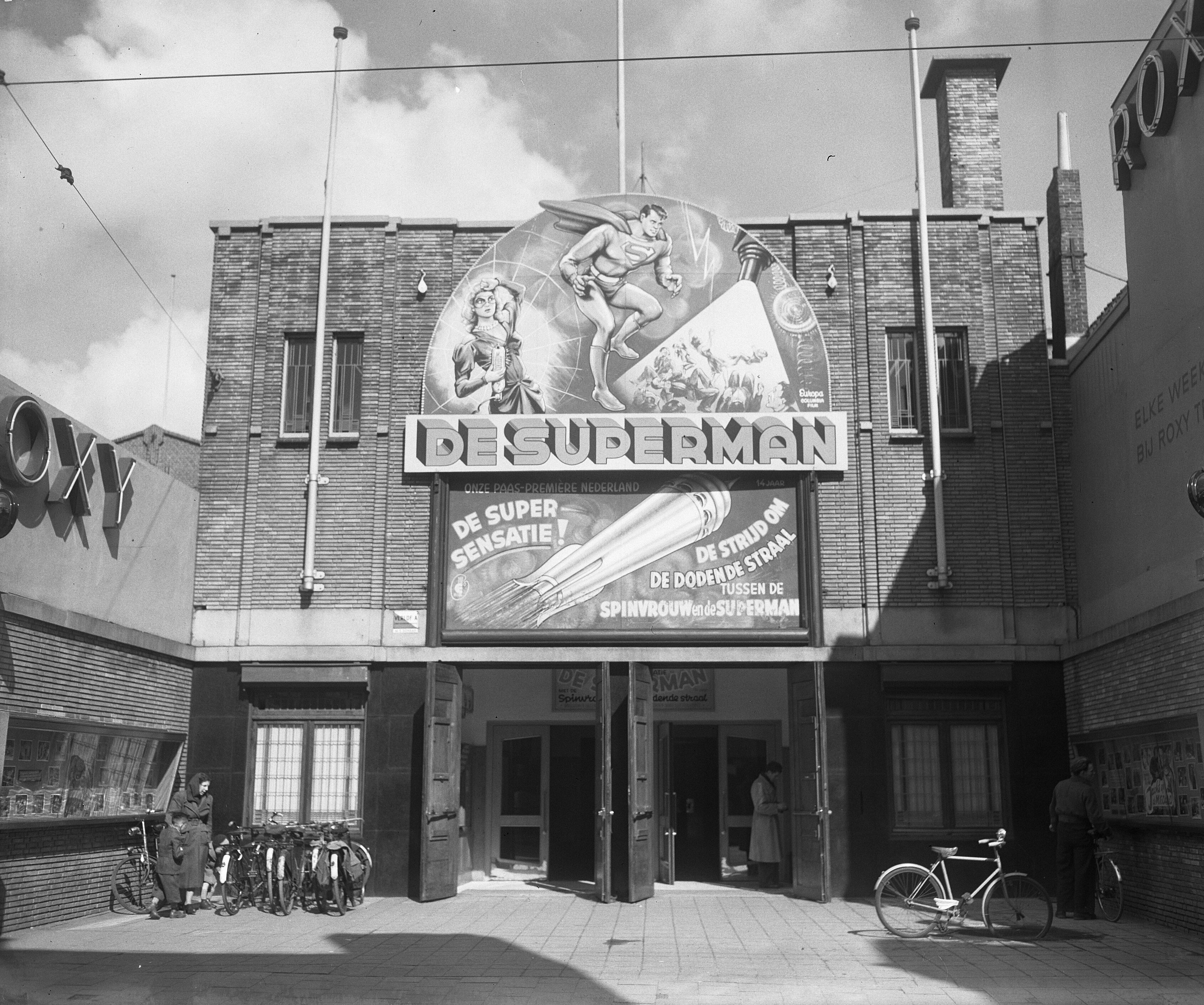 Collectie / Archief : Fotocollectie Anefo Reportage / Serie : [ onbekend ] Beschrijving : Reclame voor de film "De Superman" op de gevel van het Roxy Theater Annotatie : Opdracht Europafilm Den Haag Datum : 12 april 1950 Locatie : Den Haag, Zuid-Holland Trefwoorden : bioscopen, reclame Instellingsnaam : Roxy Theater Fotograaf : Winterbergen, […] / Anefo Auteursrechthebbende : Nationaal Archief Materiaalsoort : Glasnegatief Nummer archiefinventaris : bekijk toegang 2.24.01.09 Bestanddeelnummer : 903-9117